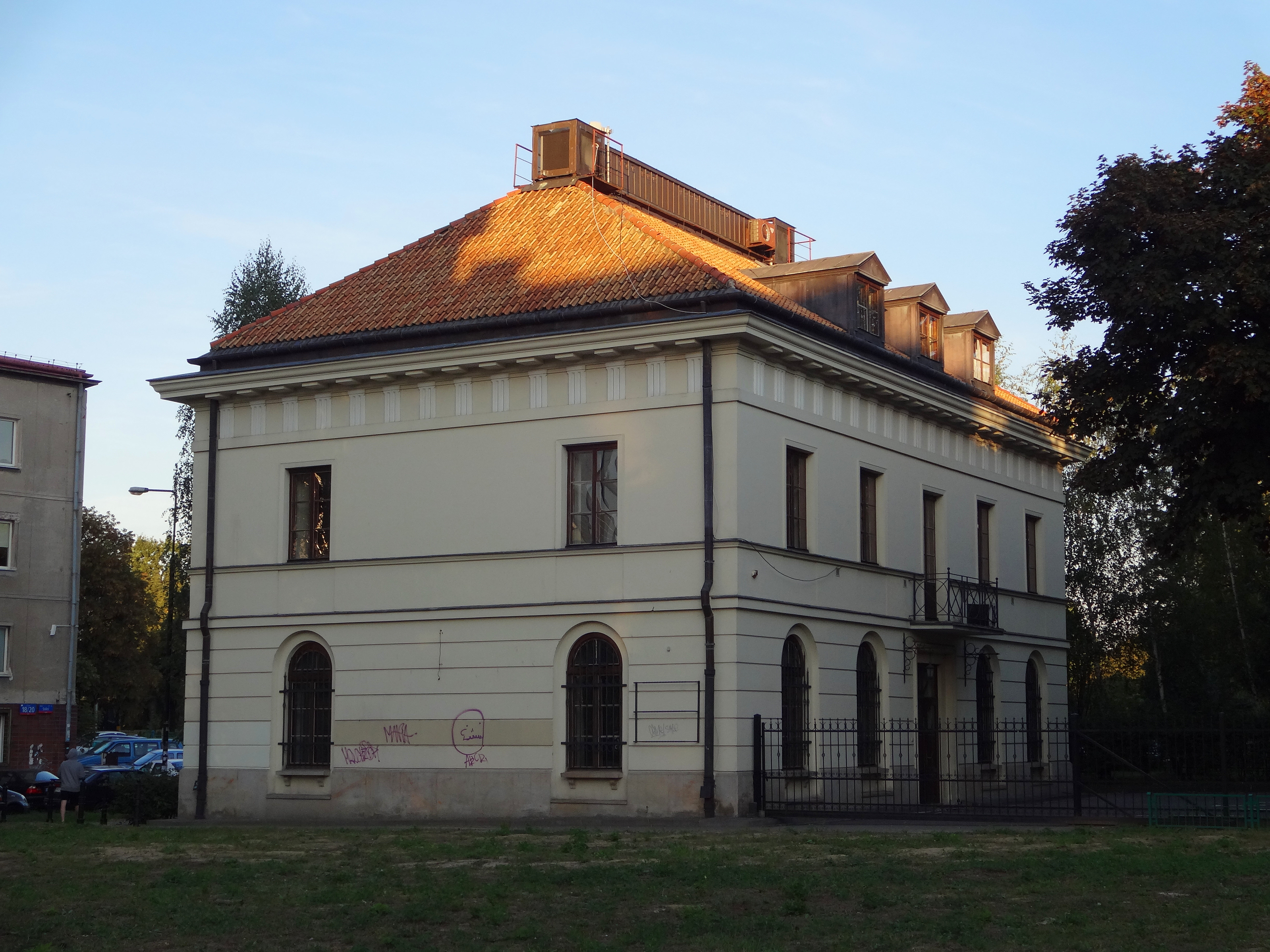 Magazyn solny, ul. Solec 63, Warszawa poł. XIX 07.1965.